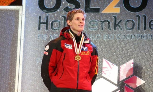 Thomas Morgenstern podczas ceremonii medalowej po konkursie indywidualnym na skoczni normalnej w ramach Mistrzostw Świata w Narciarstwie Klasycznym 2011 w Oslo.